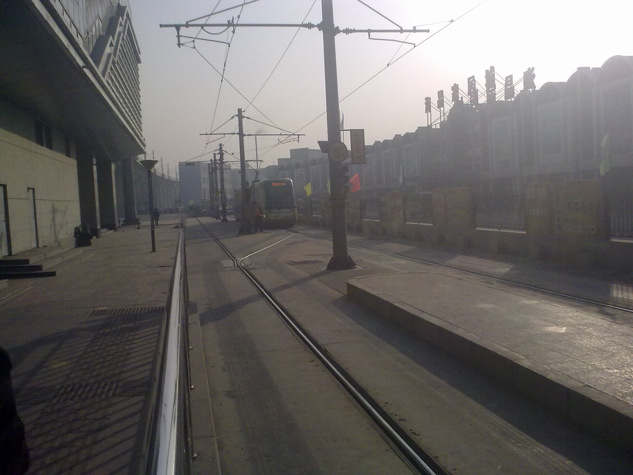 天津开发区导轨电车泰达站站台